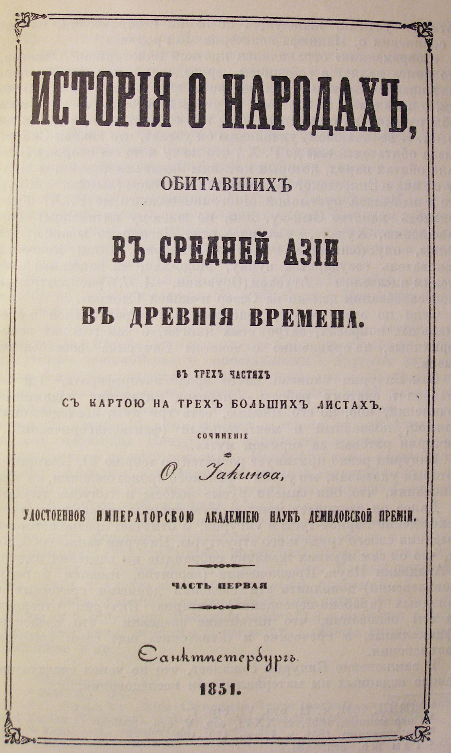 Обложка "Собрания сведений о народах, обитавших в средней Азии в древние времена", издание 1851 года. Примечательно, что на титульном листе напечатано именно "Собрание сведений..."